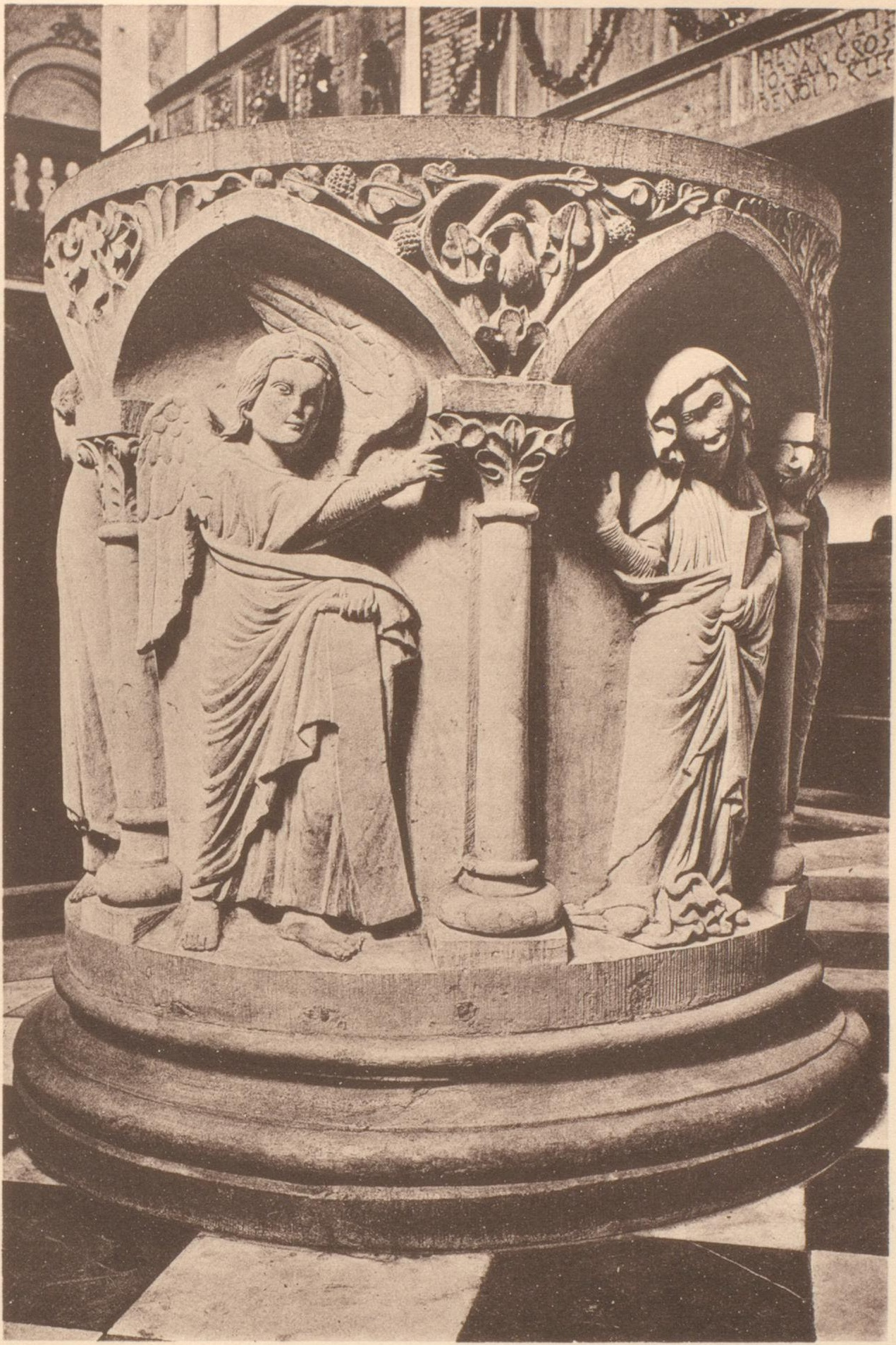 Vorderseite des romanischen Taufsteins der Johann Baptistkirche in Brechten um 1890